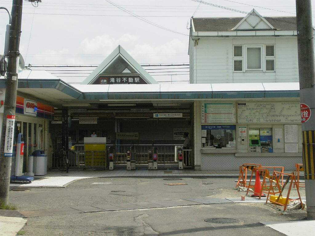 近鉄滝谷不動駅